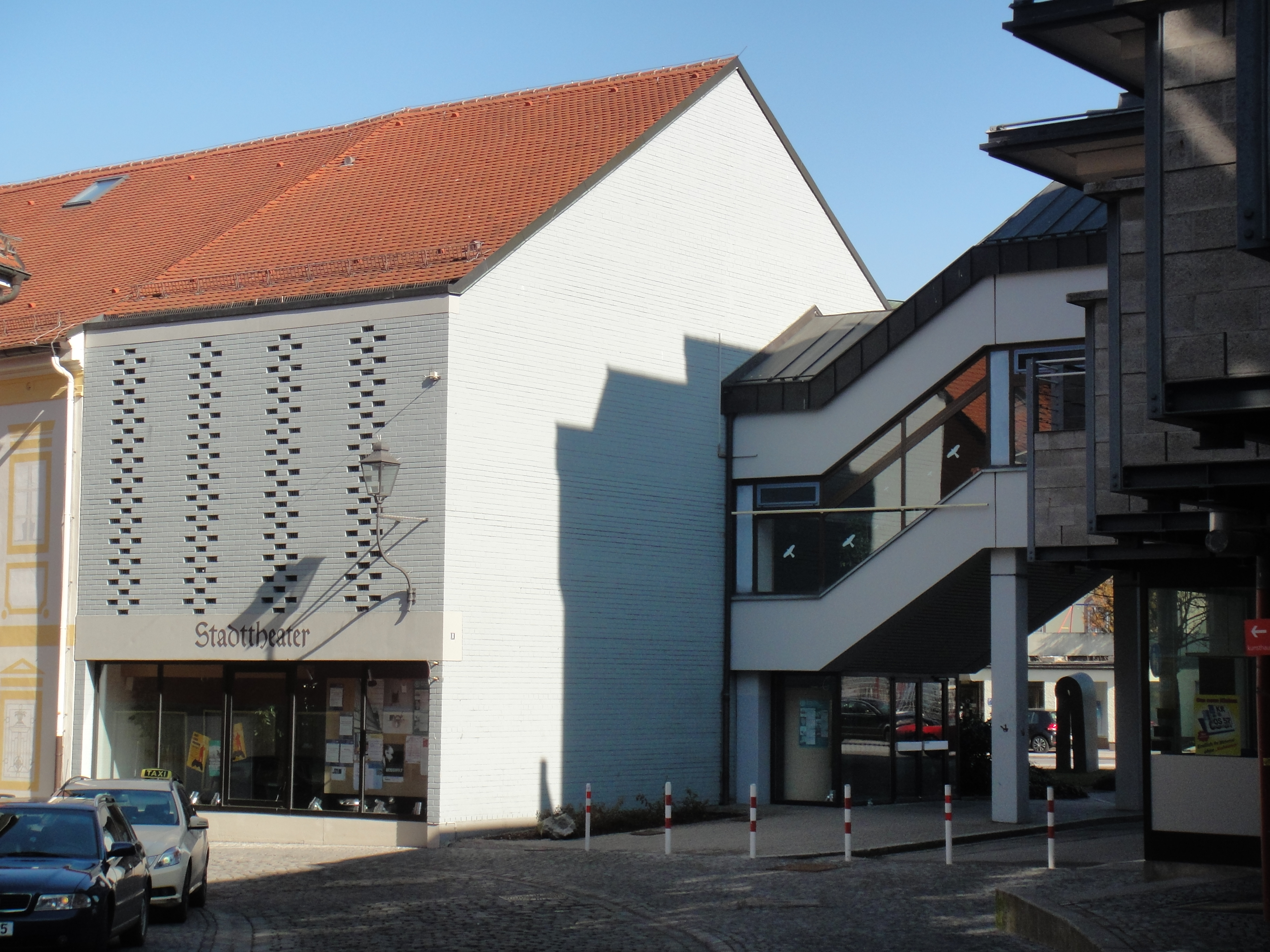 Kaufbeuren, Rosental 8